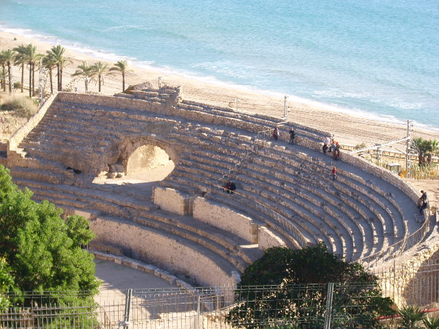 Anfiteatro romano, Tarragona, Novembro 2009